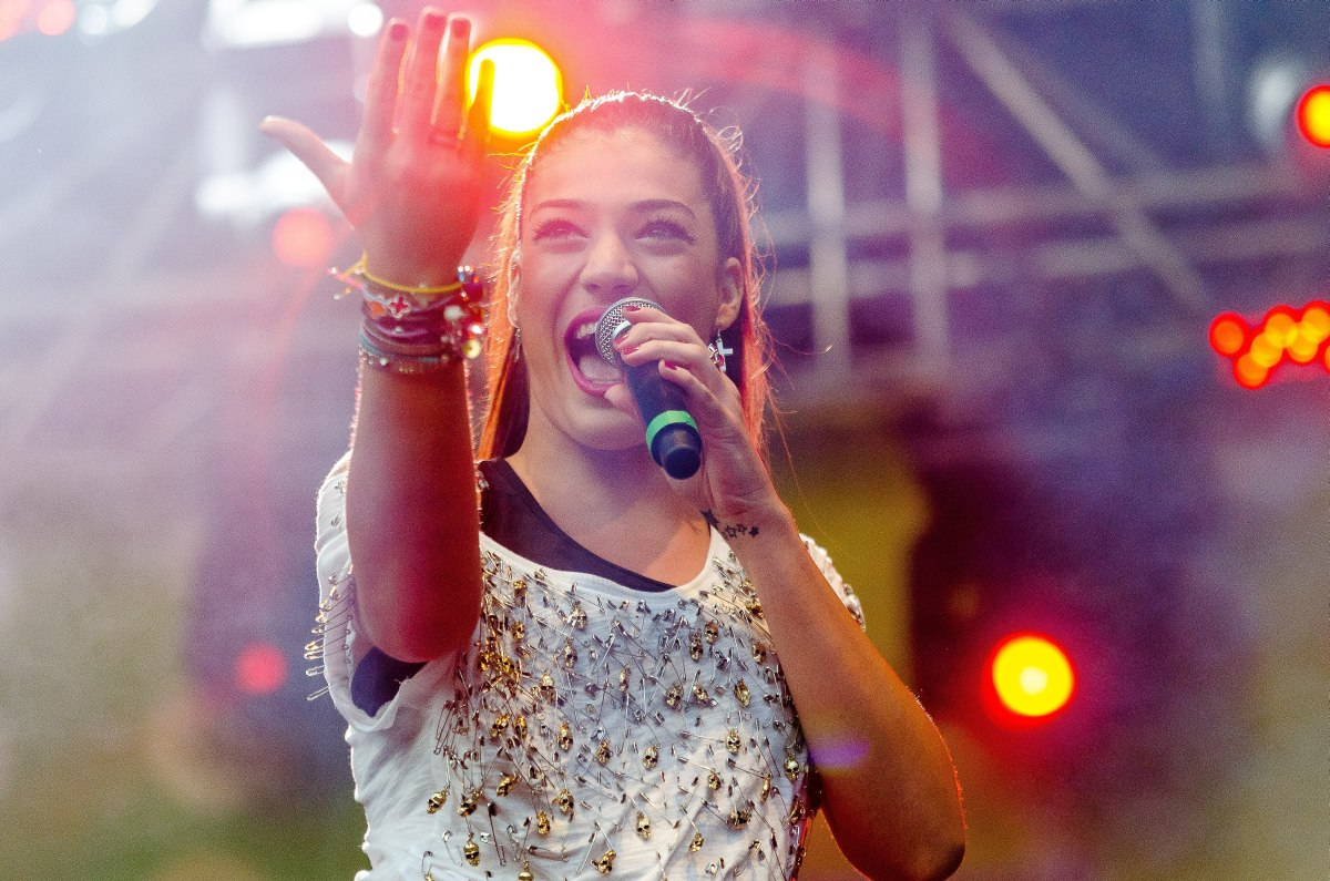 Cypriotiska sångerskan Ivi Adamou på Rix FM Festival i Växjö 2012.